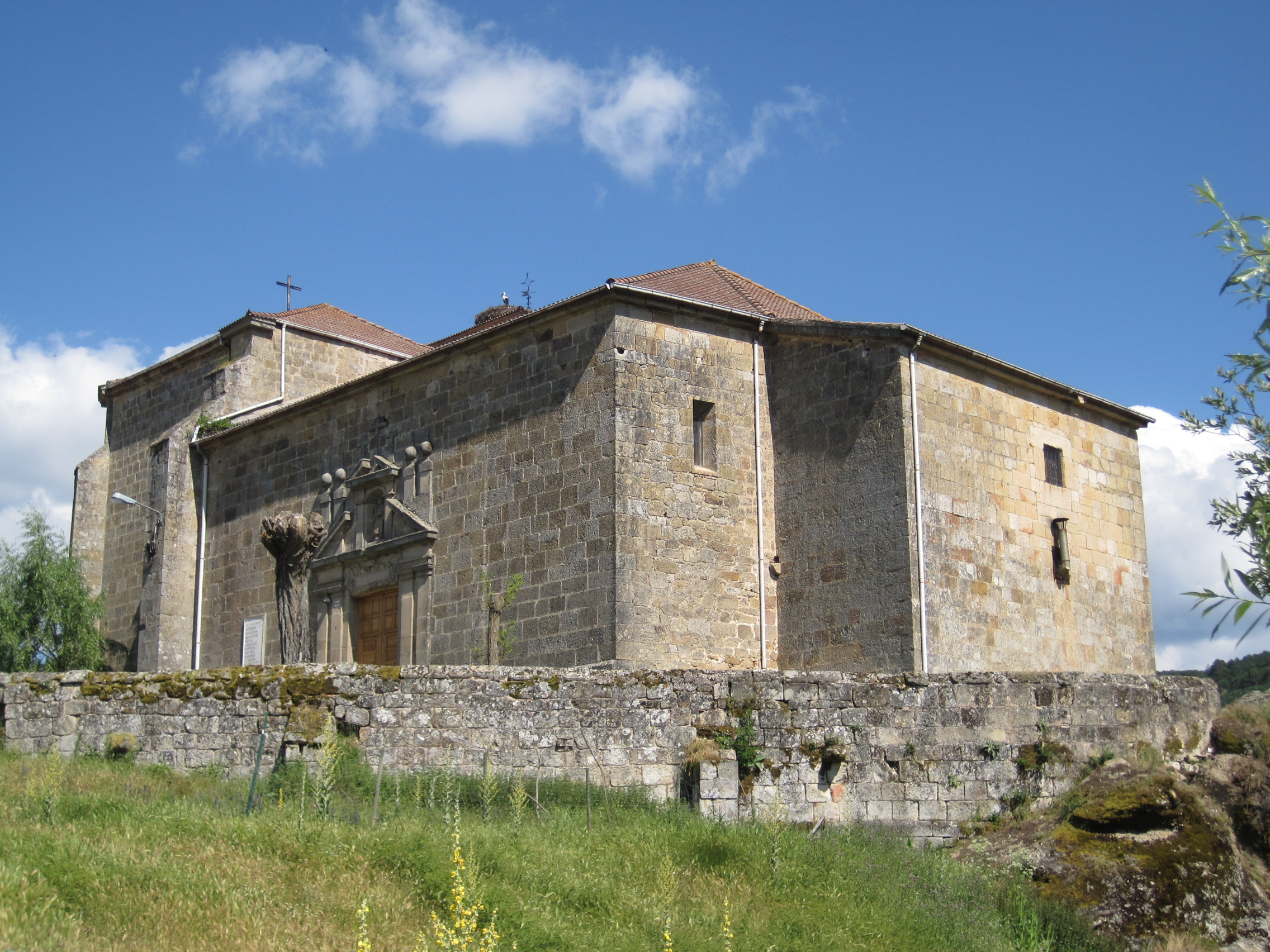 Iglesia de Canicosa de la Sierra (Burgos, España).